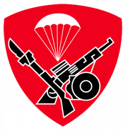 Gambar ini adalah lambang Korps Pasukan Khas